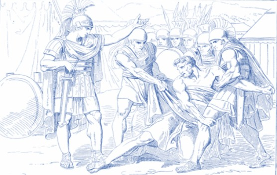 Filisto viene catturato vivo dai Siracusani - XIX sec. Tavola in rame di artista del 1844.